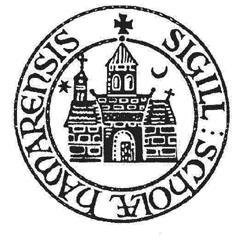 Hamar katedralskoles segl.